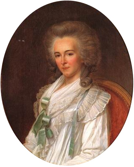 Portrait of Bathilde d'Orléans (1750-1822)